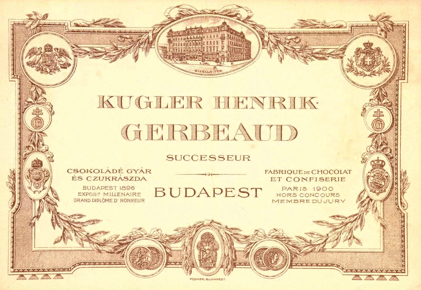 Képeslap? Kugler Henrik Gerbeaud successeur; Csokoládé Gyár és Czukrászda, Budapest 1896 Expo Paris (1900)